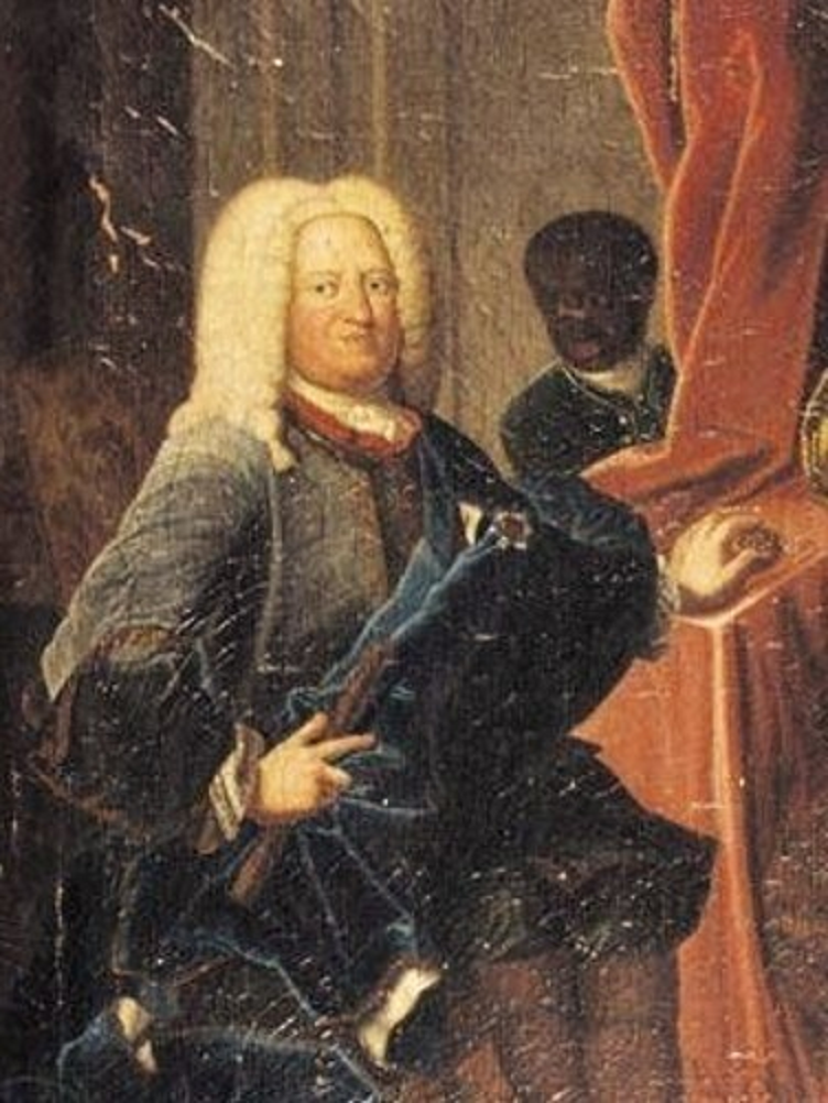 Bildnis des Prinzen Ernst Leopold von Schleswig-Holstein-Norburg (1685—1722), kaiserlichen Generalfeldwachtmeisters und Titular-Herzogs von Schleswig-Holstein-Norburg